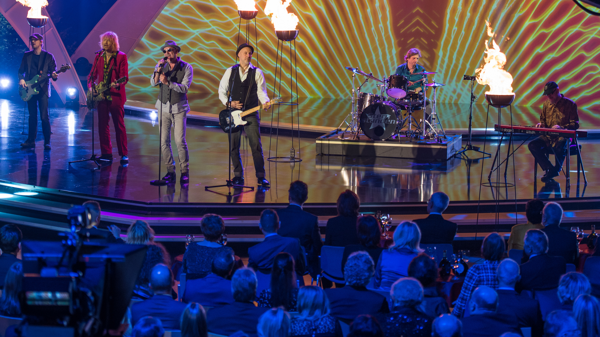 BR,Bayerisches Fernsehen,Christian Decker,Christof Stein-Schneider,Frankenhalle,Fury in the Slaughterhouse,Gero Drnek,Kai Wingenfelder,Live-Sendung,Rainer Schumann,Sternstunden-Gala,Sternstundengala,Thorsten Wingenfelder